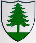 Wappen von Le Pâquier Kanton Neuneburg Schweiz